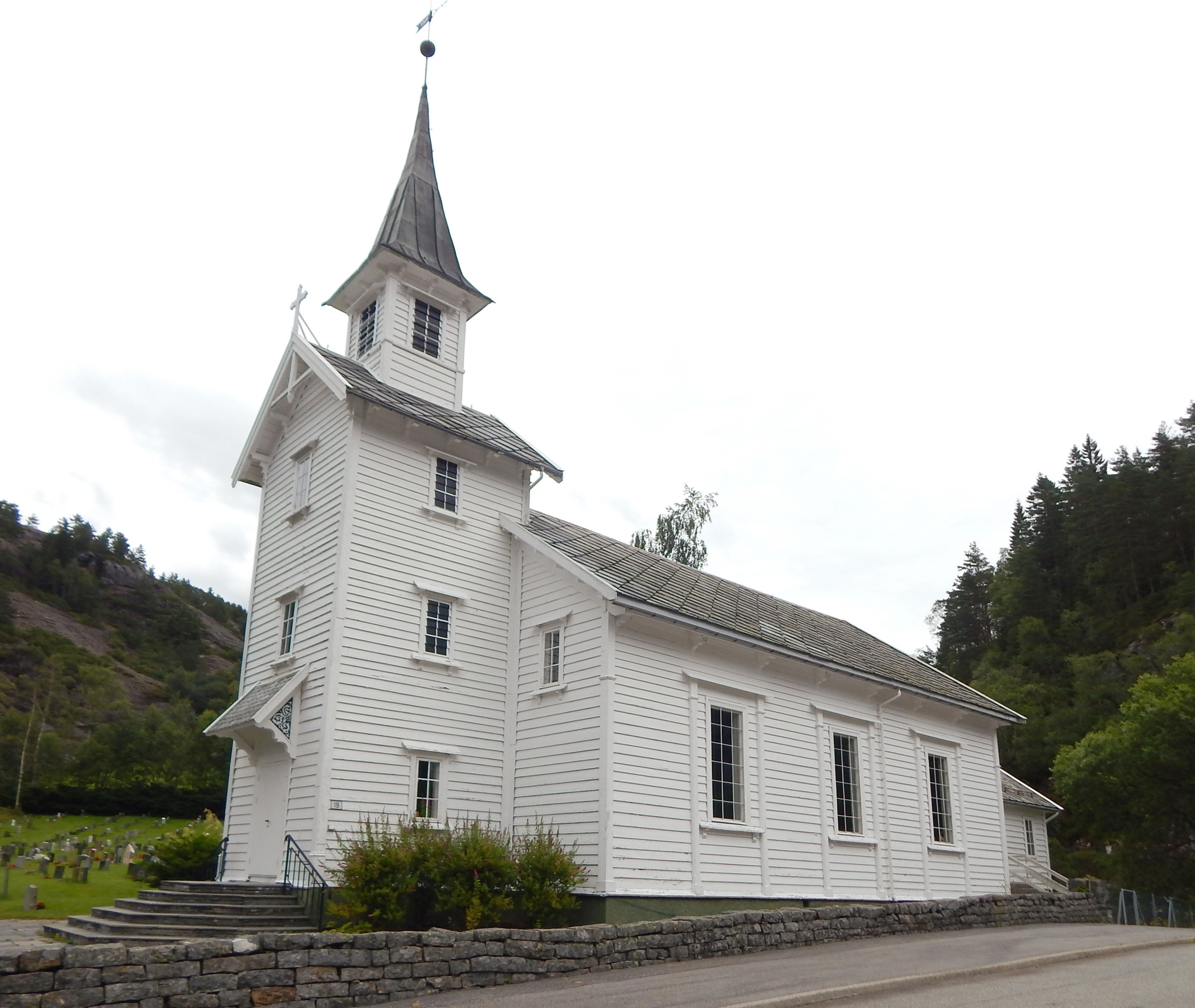 Stamnes kirke